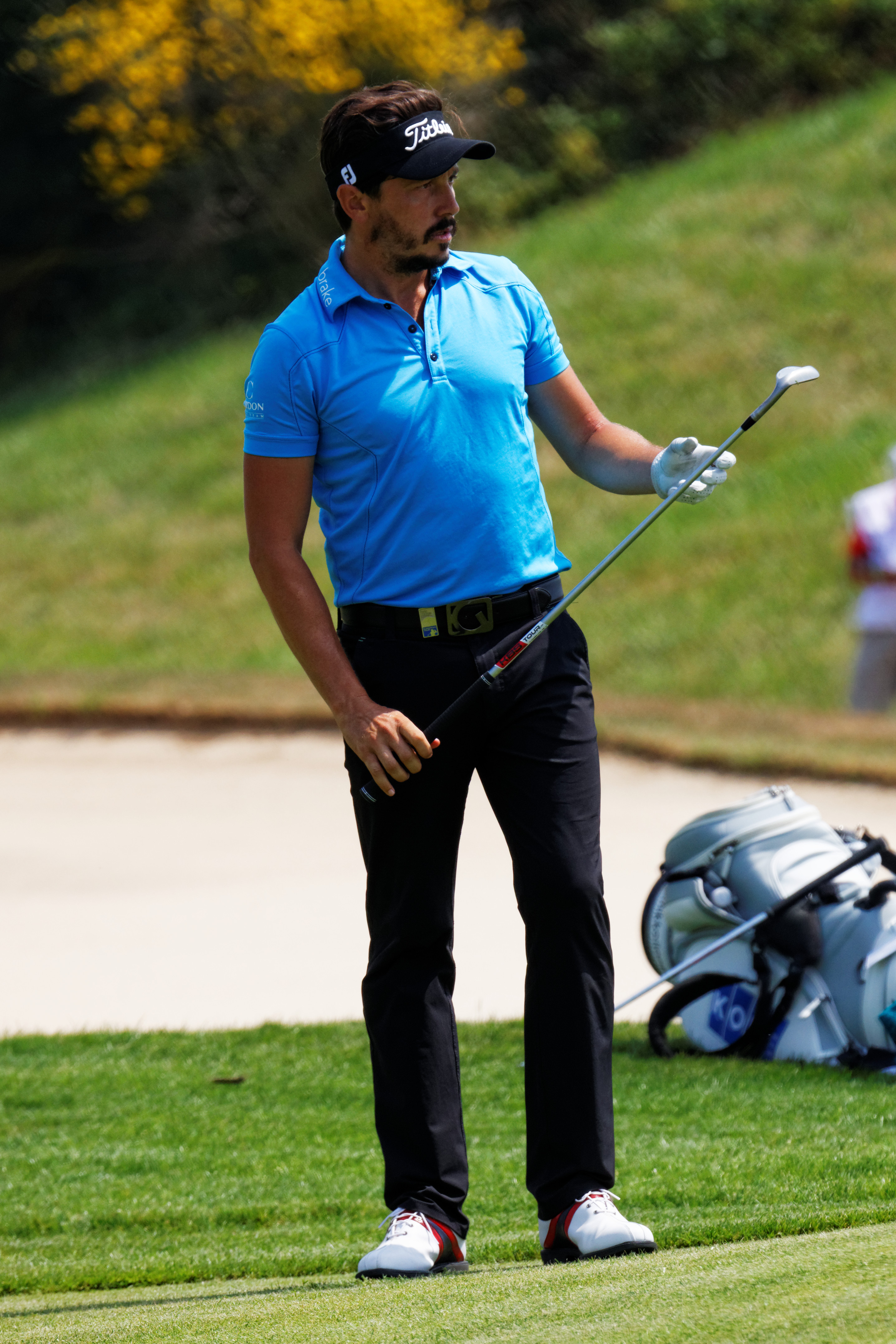 Photo prise lors l'Alstom - Open de France de Golf, en juil 2015